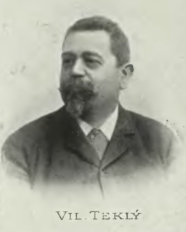 Portrét – Vilém Teklý (1848-1925), Český pedagog, agrární odborník a politik.